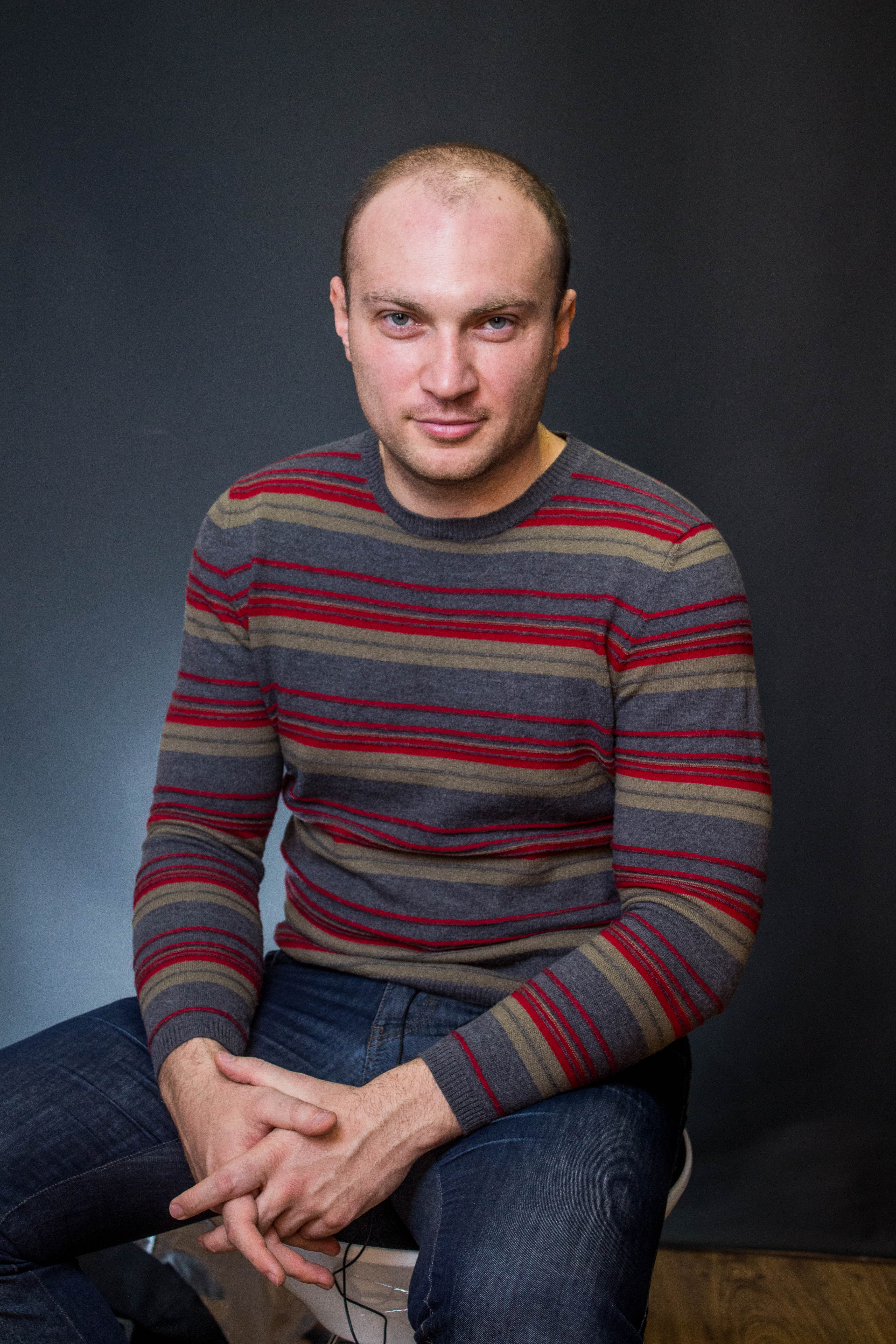 صورة شخصية